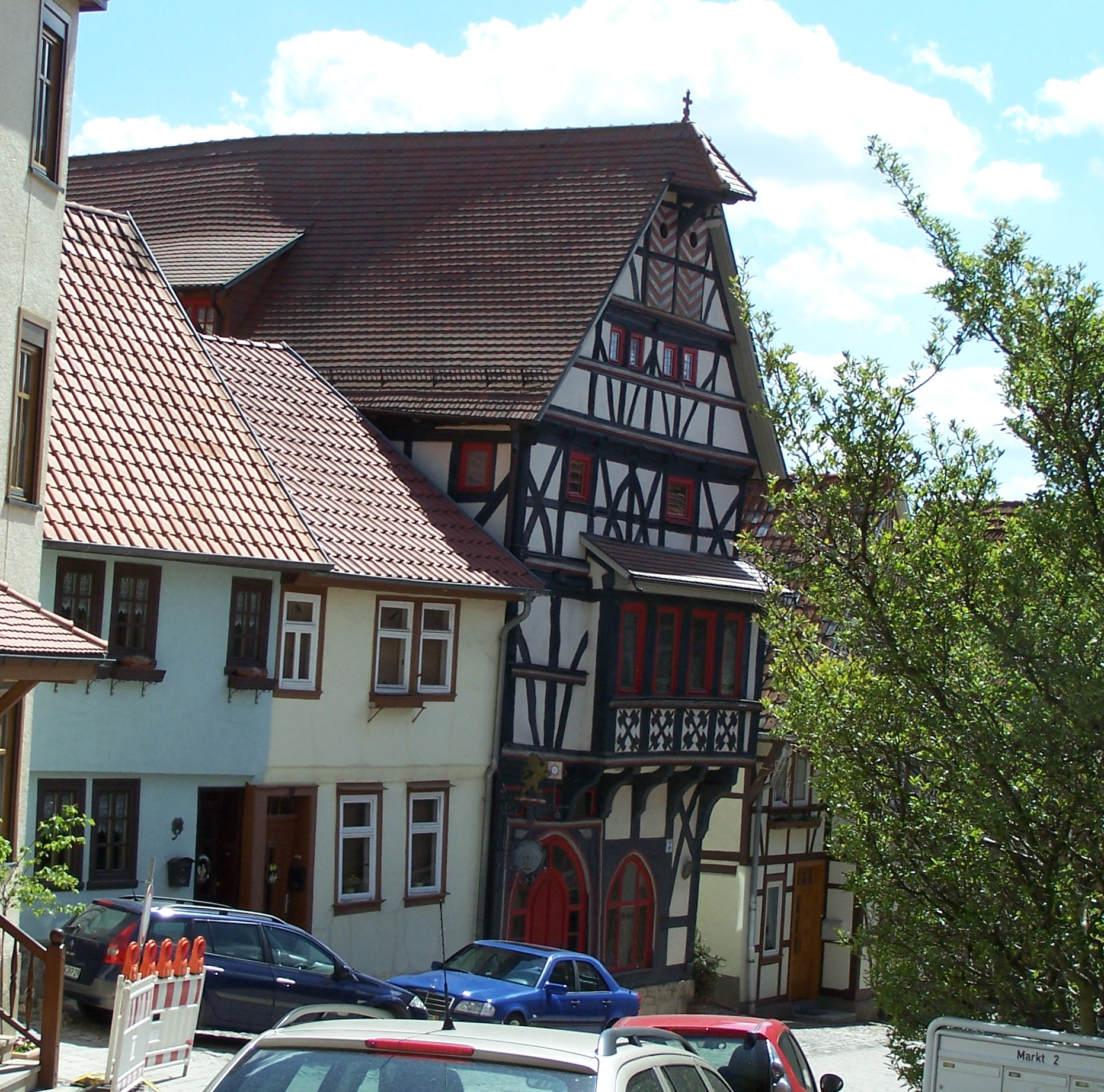 Ansicht vom Marktplatz, nach Sanierung.